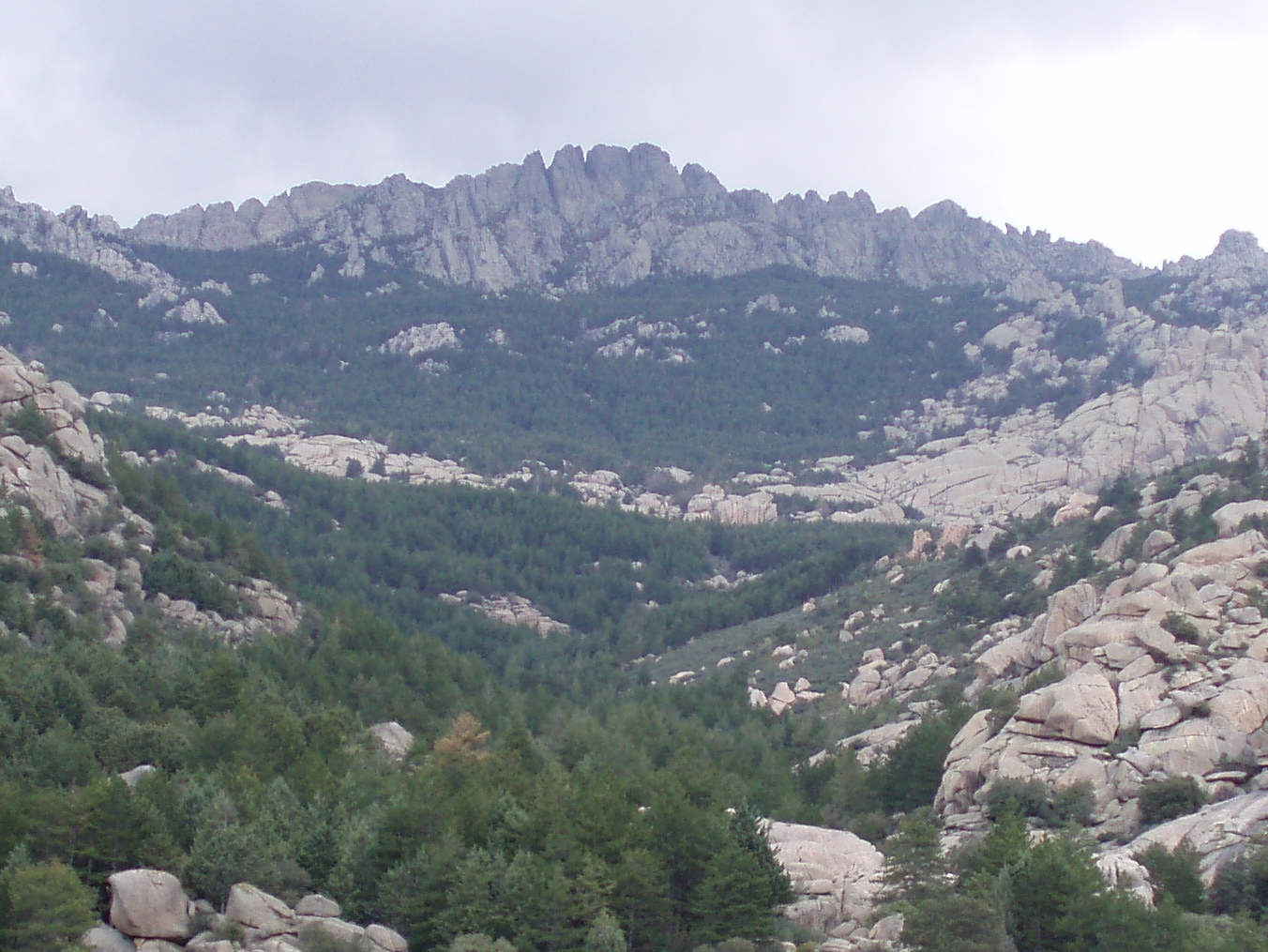 Torres de La Pedriza (Sierra de Guadarrama, España).